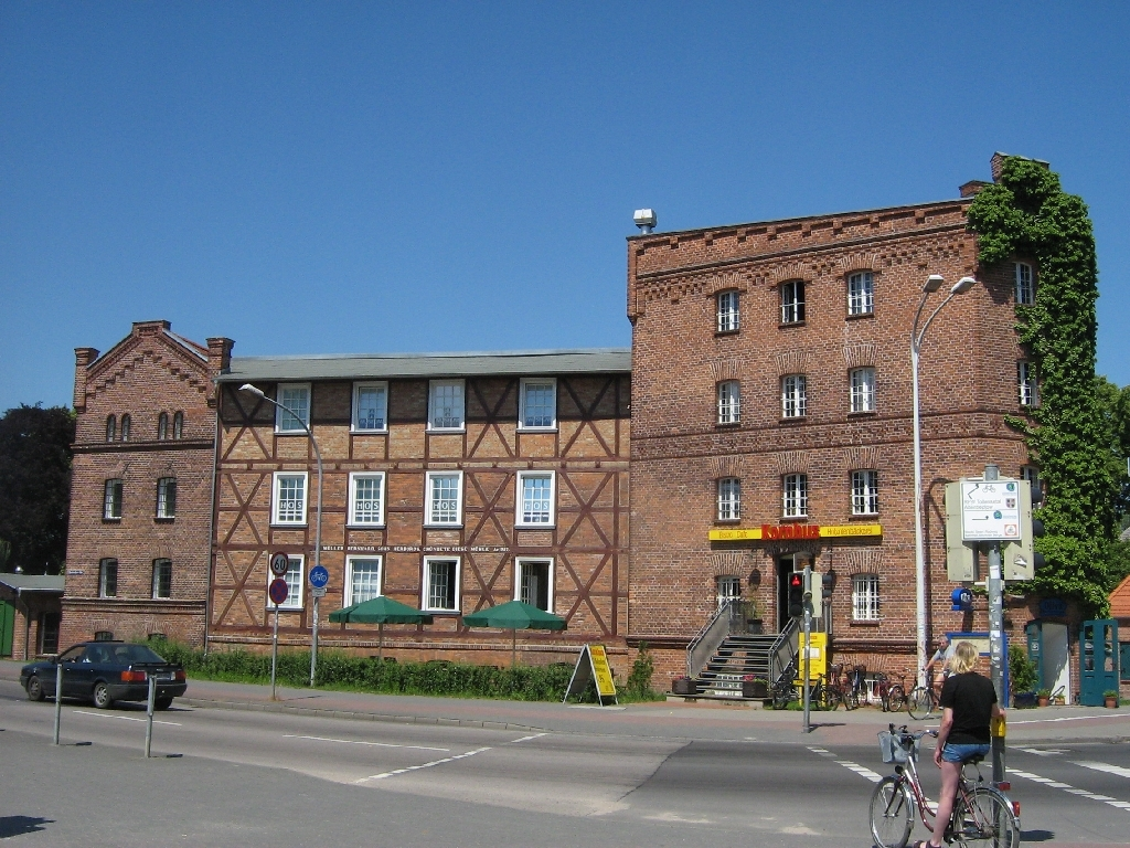 Ehem. Vierrademühle in Neubrandenburg. Sie wurde vom Wasser des Oberbaches angetrieben. Der Oberbach ist ein mittelalterlicher Kanal und stellt heute den wichtigsten Zufluss des Oberlaufes der Tollense dar.